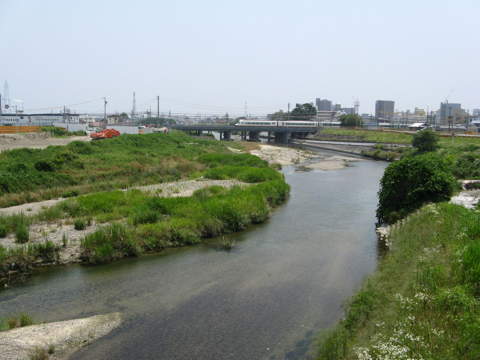 三滝川 堀木橋から下流方を望む 近鉄名古屋線が渡河